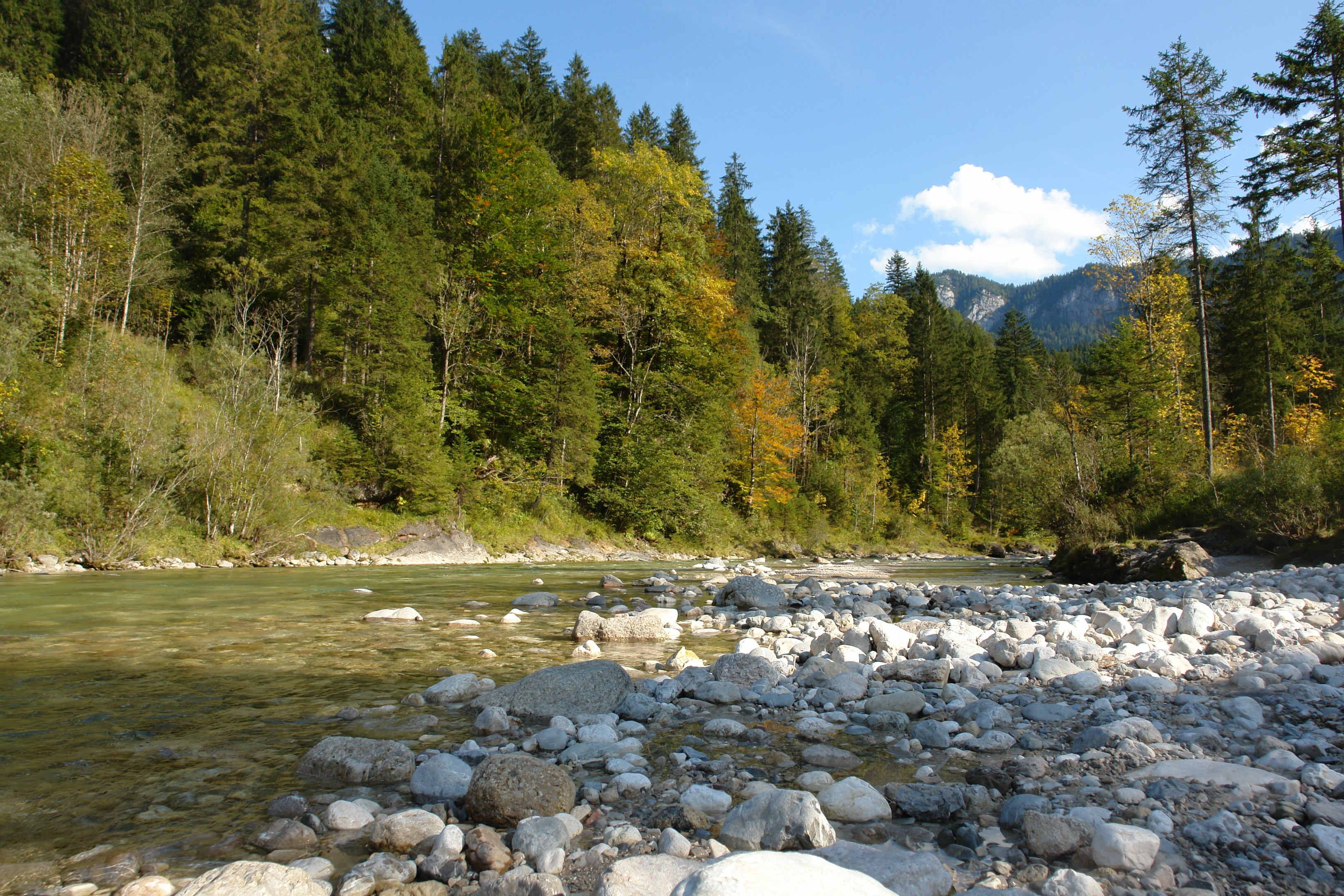 Brandenberger Ache, im Gebiet der Gemeinden Brandenberg, Kramsach, fließt noch gemächlich dahin, bevor sie bald danach durch die Kaiserklamm tobt This media shows the natural monument in the Tyrol with the ID ND_5_61.